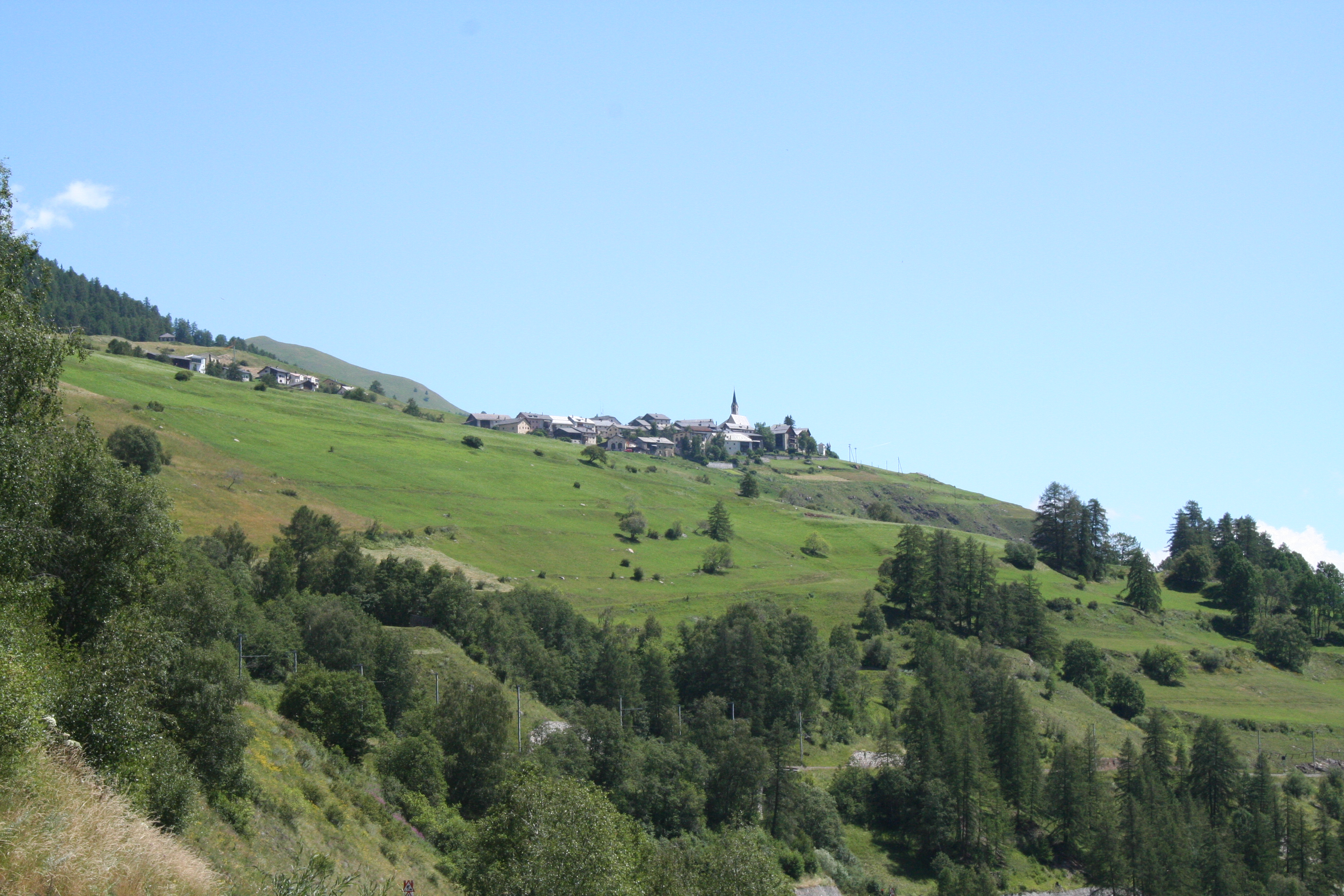 Guarda, Sicht von Norden